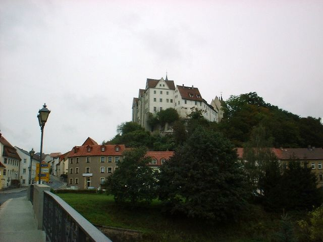 Blick von der Freiberger Mulde auf das Schloss Nossen Foto selbst erstellt: von Benutzer:Acf (2004) Public Domain